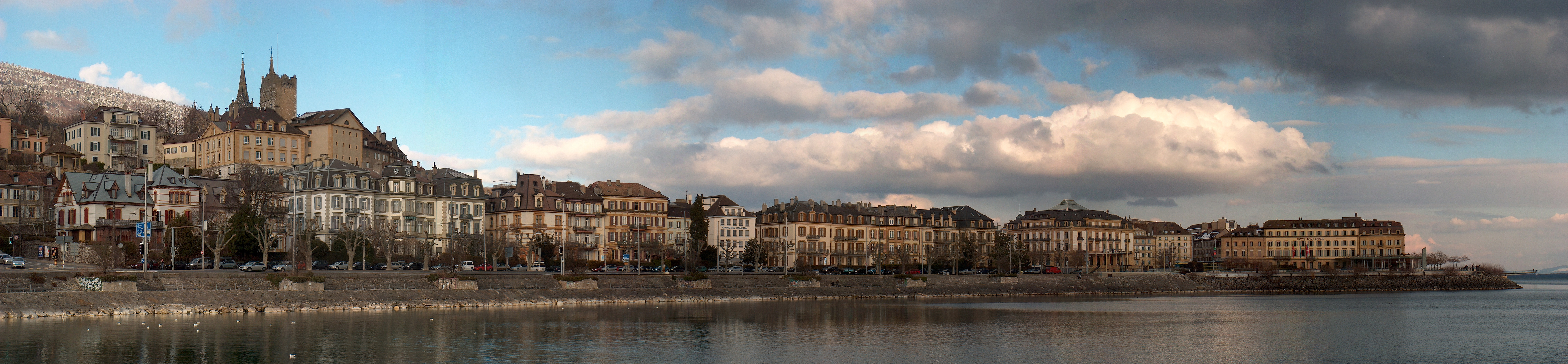 Vue sur neuchatel